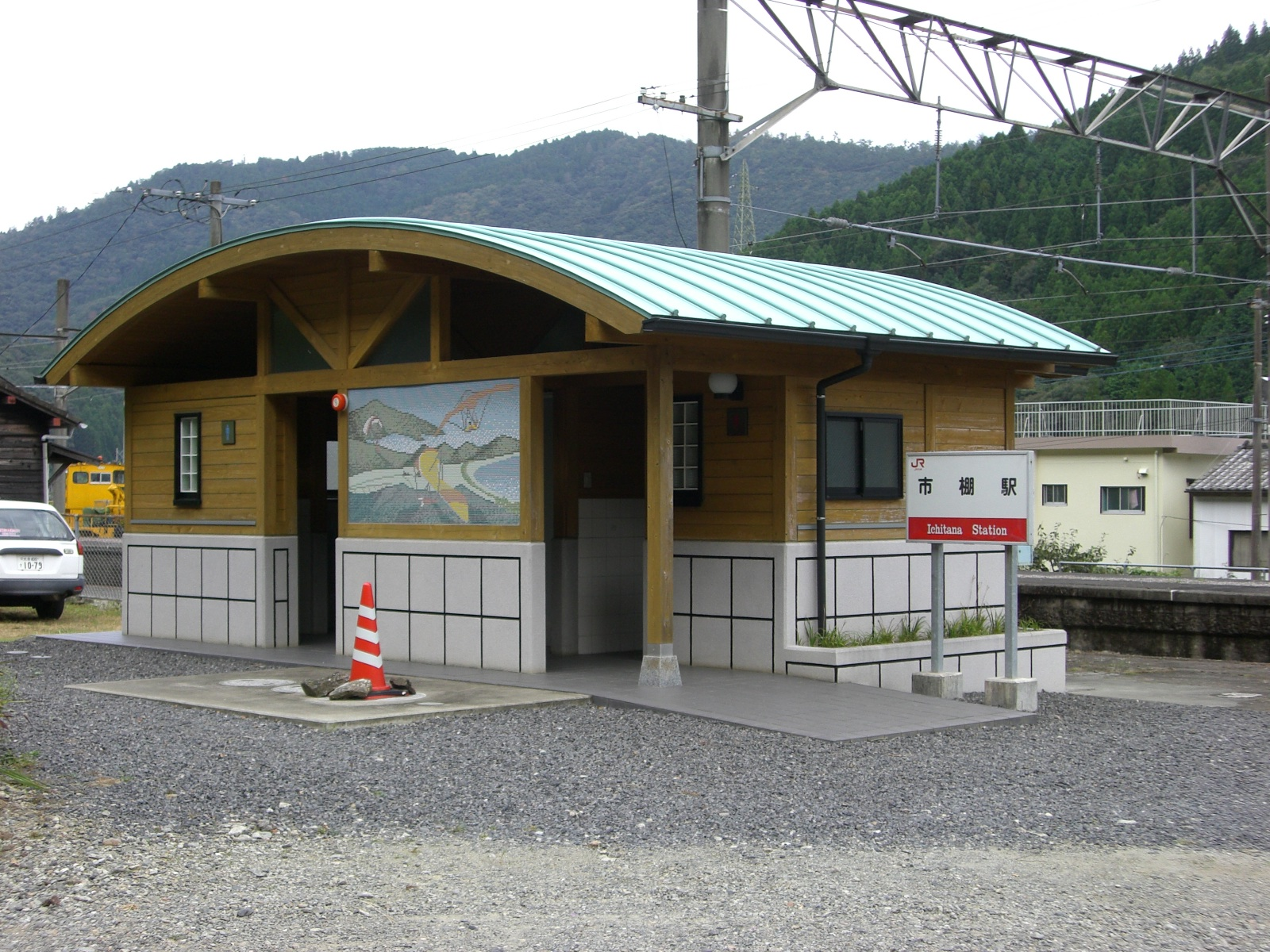 市棚駅駅舎